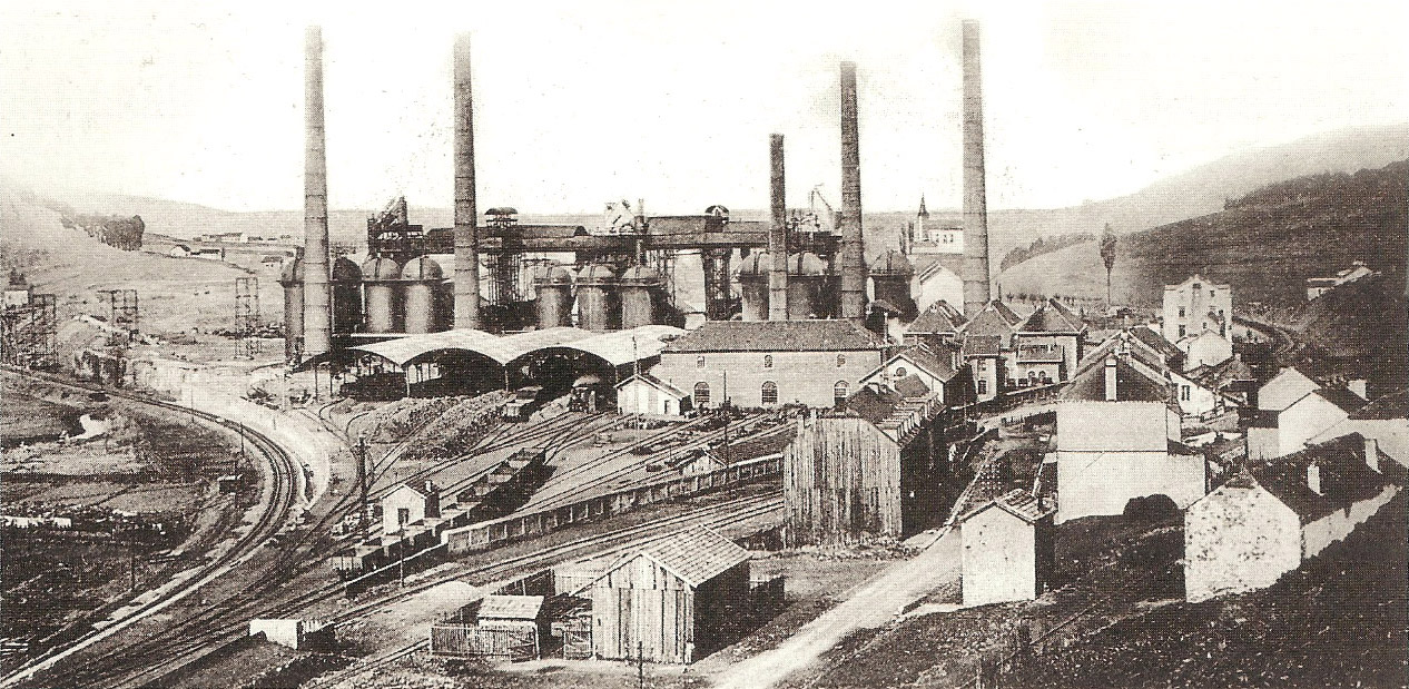 D'Rëmelenger Schmelz vum Lannebierg aus gesinn (lénks gesäit een d'Seelbunn vum Huttbierg erofkommen).